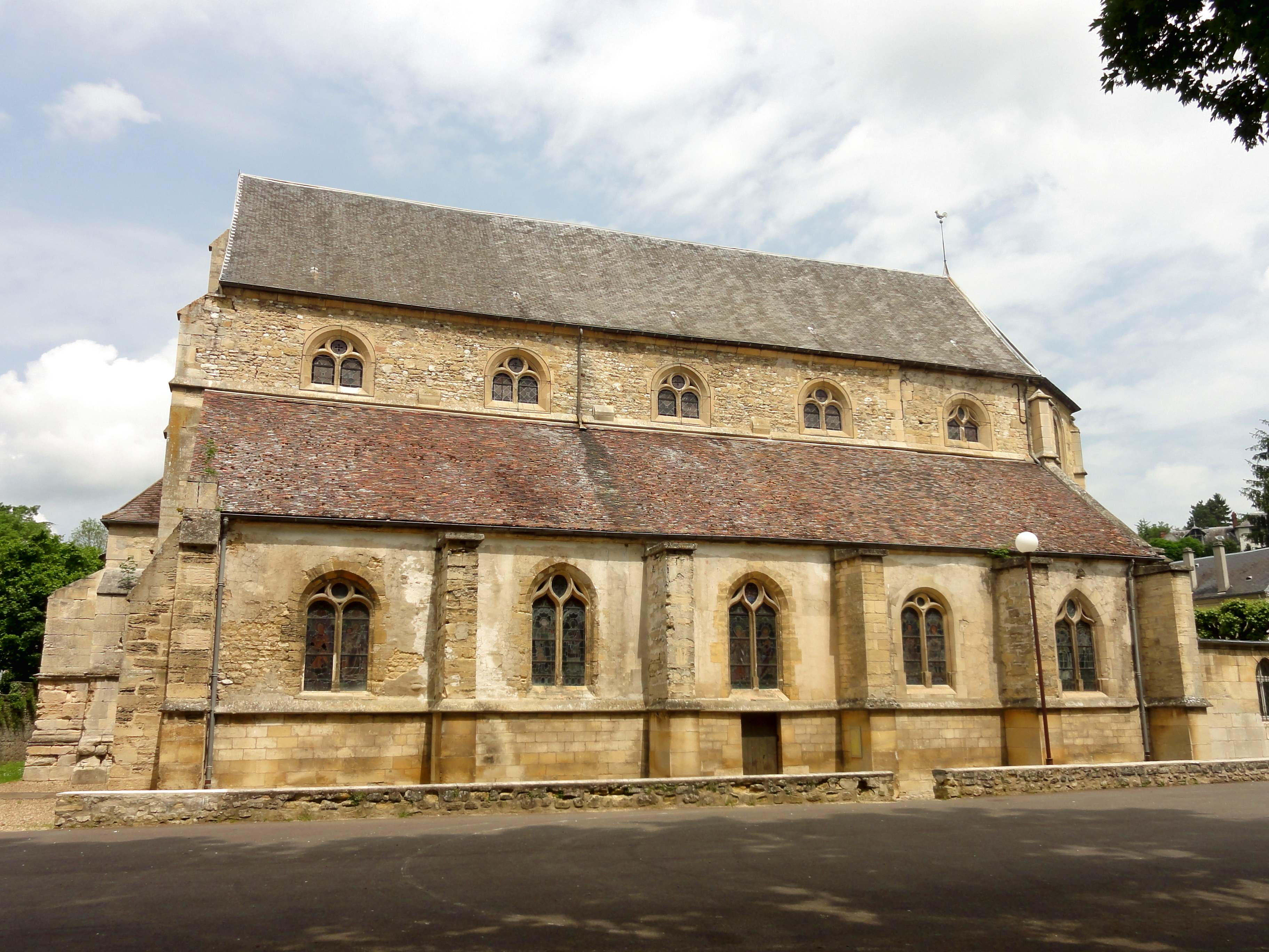 Église Saint-Germain de Mézy-sur-Seine - voir titre.